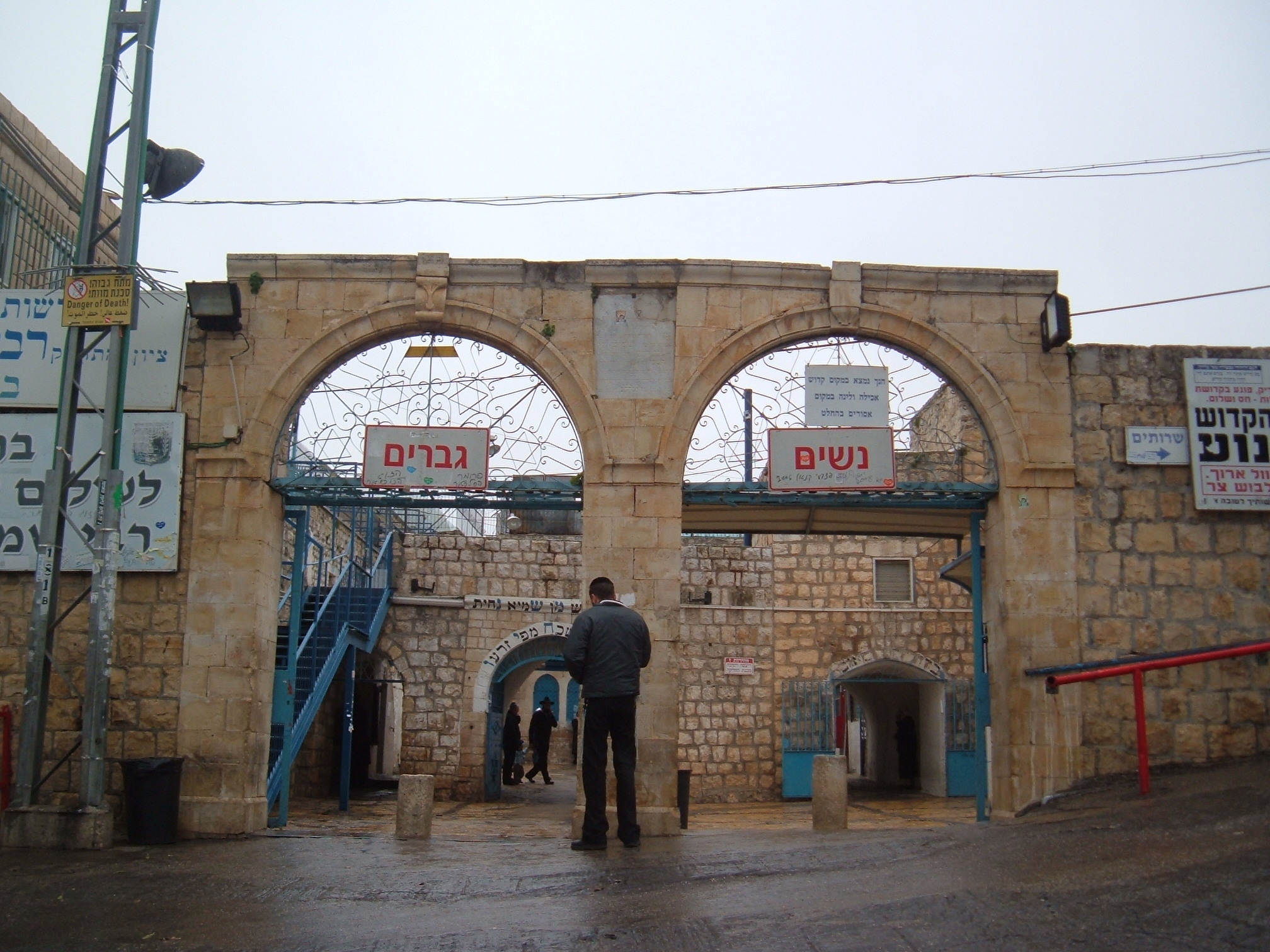 Entrance to the Bar Yohay Garve site in Meron Israel הכניסה לאתר קברו של שמעון בר יוחאי במירון